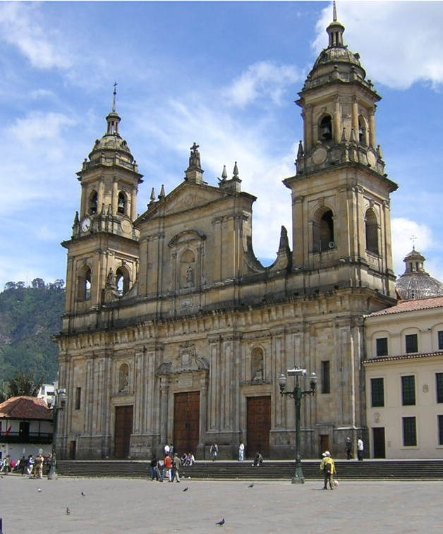 Central Primada de Colombia, Bogotá D.C., Colombia